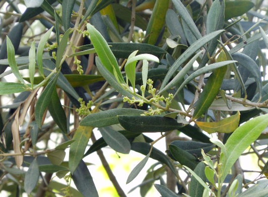 Olea europaea europaea europaea cultivar Salonenque feuillage et inflorescence (Montpellier, 1/05/2013)